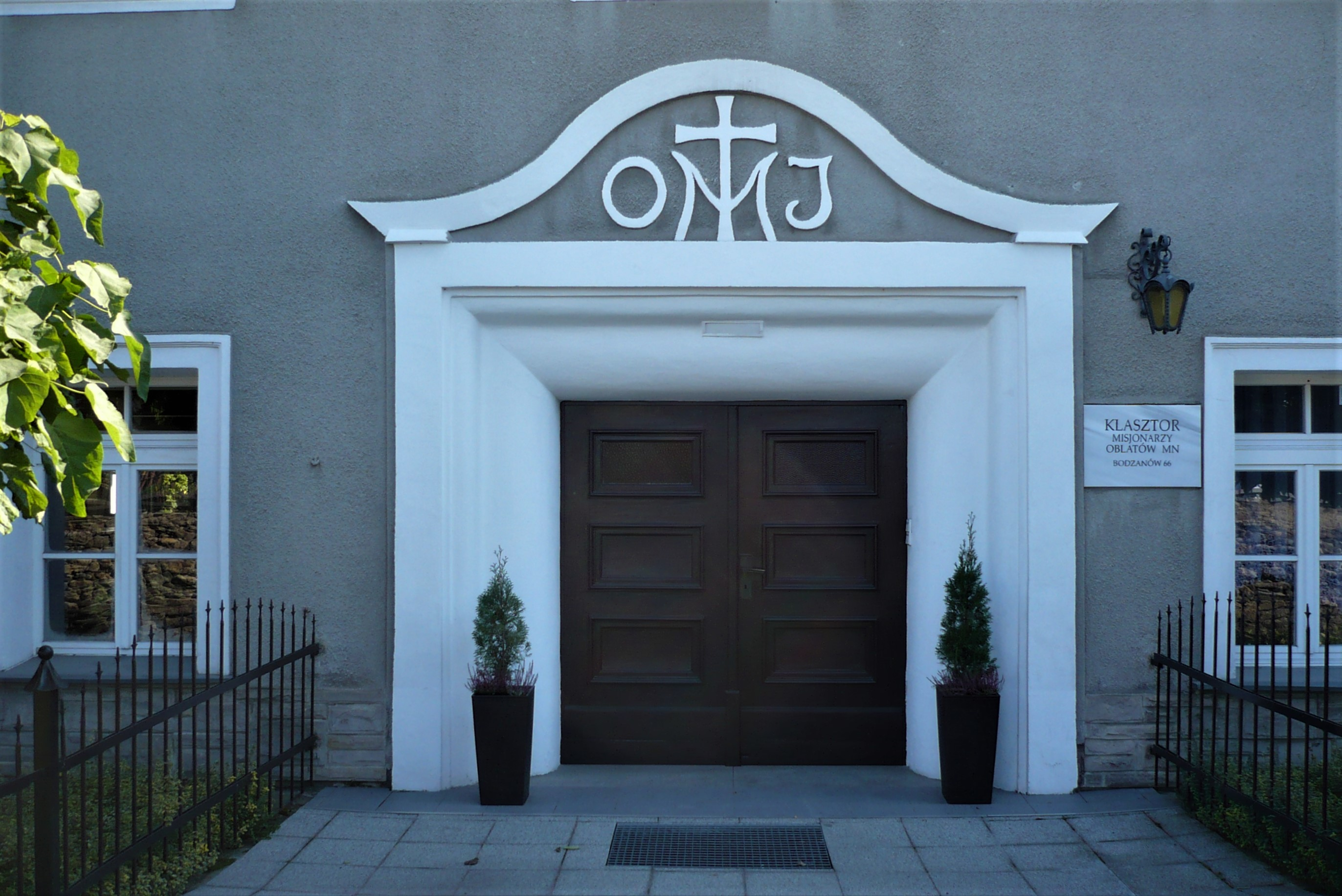 Bodzanów. Klasztor oblatów